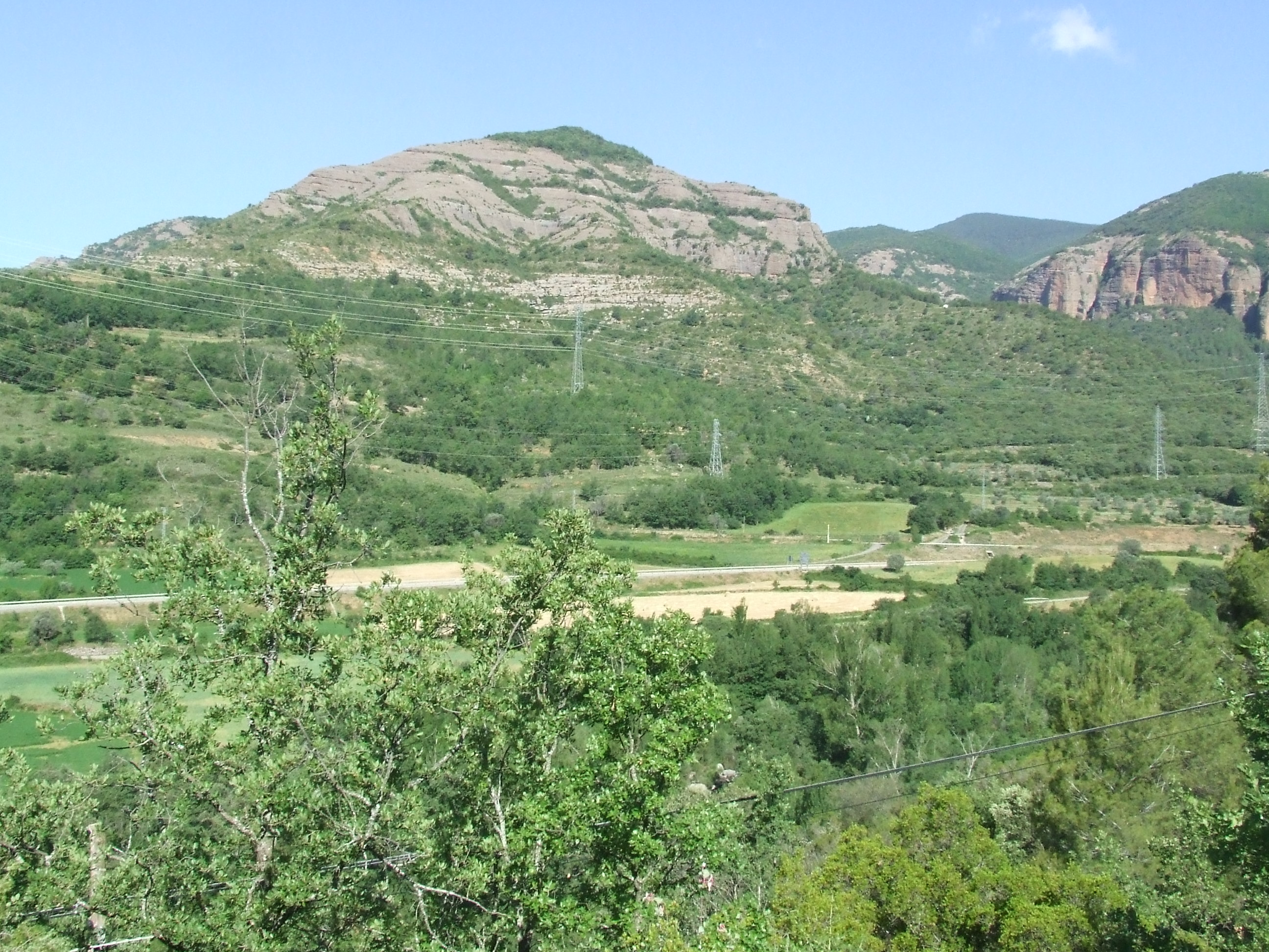 El Tossal dels Corbs (Erinyà, Toralla i Serradell, Conca de Dalt, Pallars Jussà)